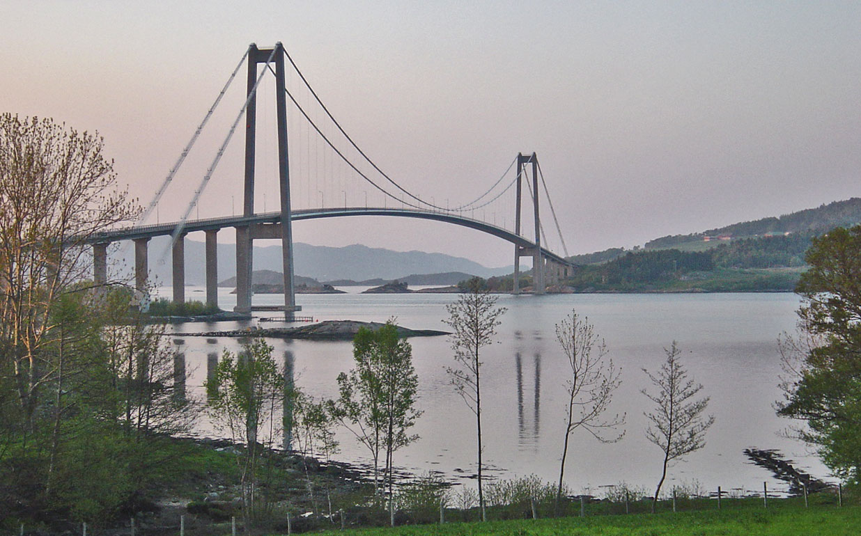 Gjemnessundbrua, Norway